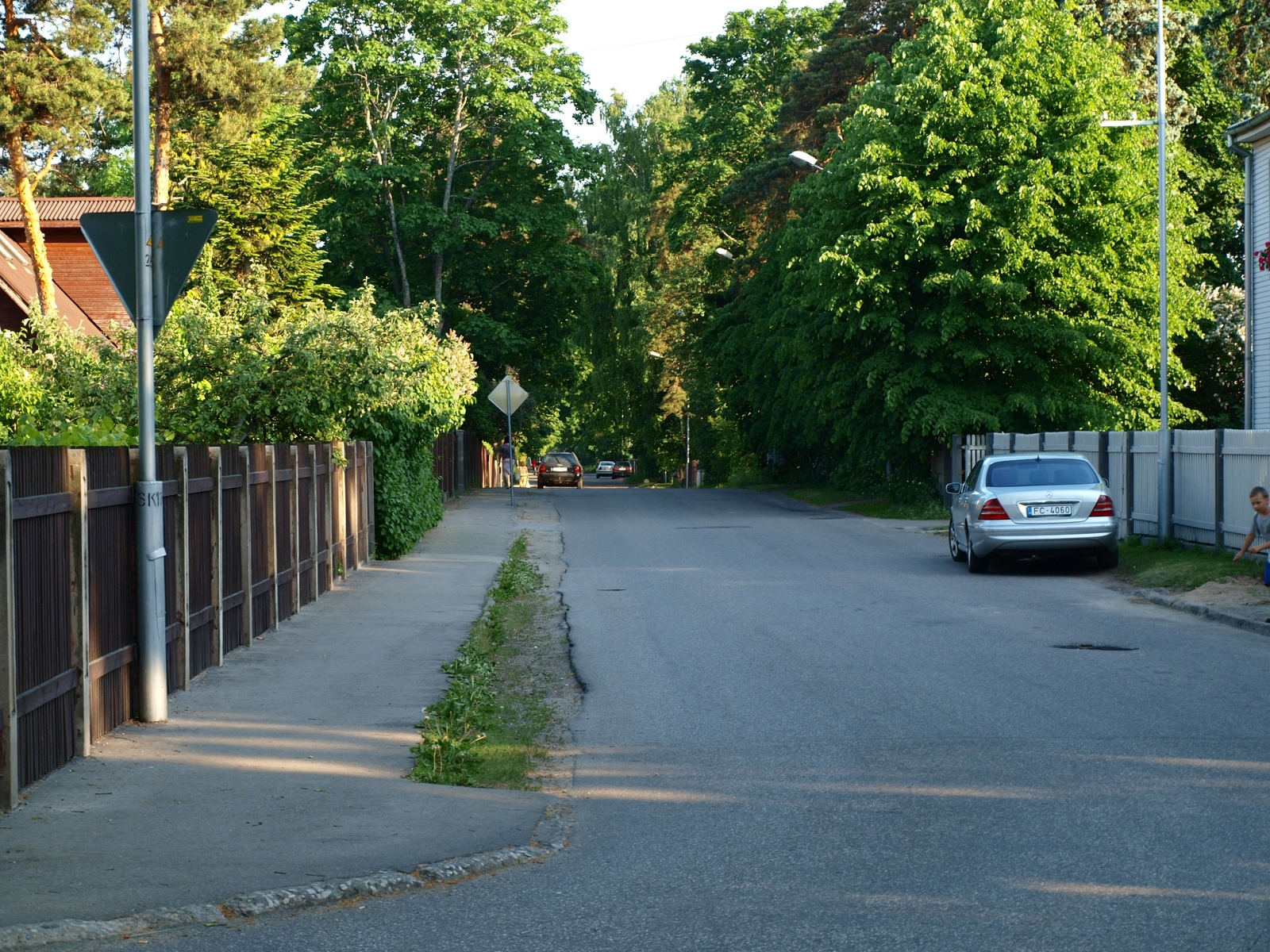 plieksana iela